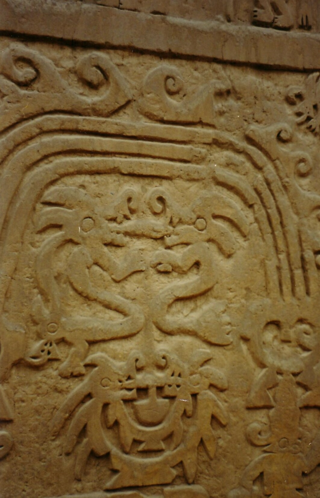 Huaca del Dragon, Trujillo